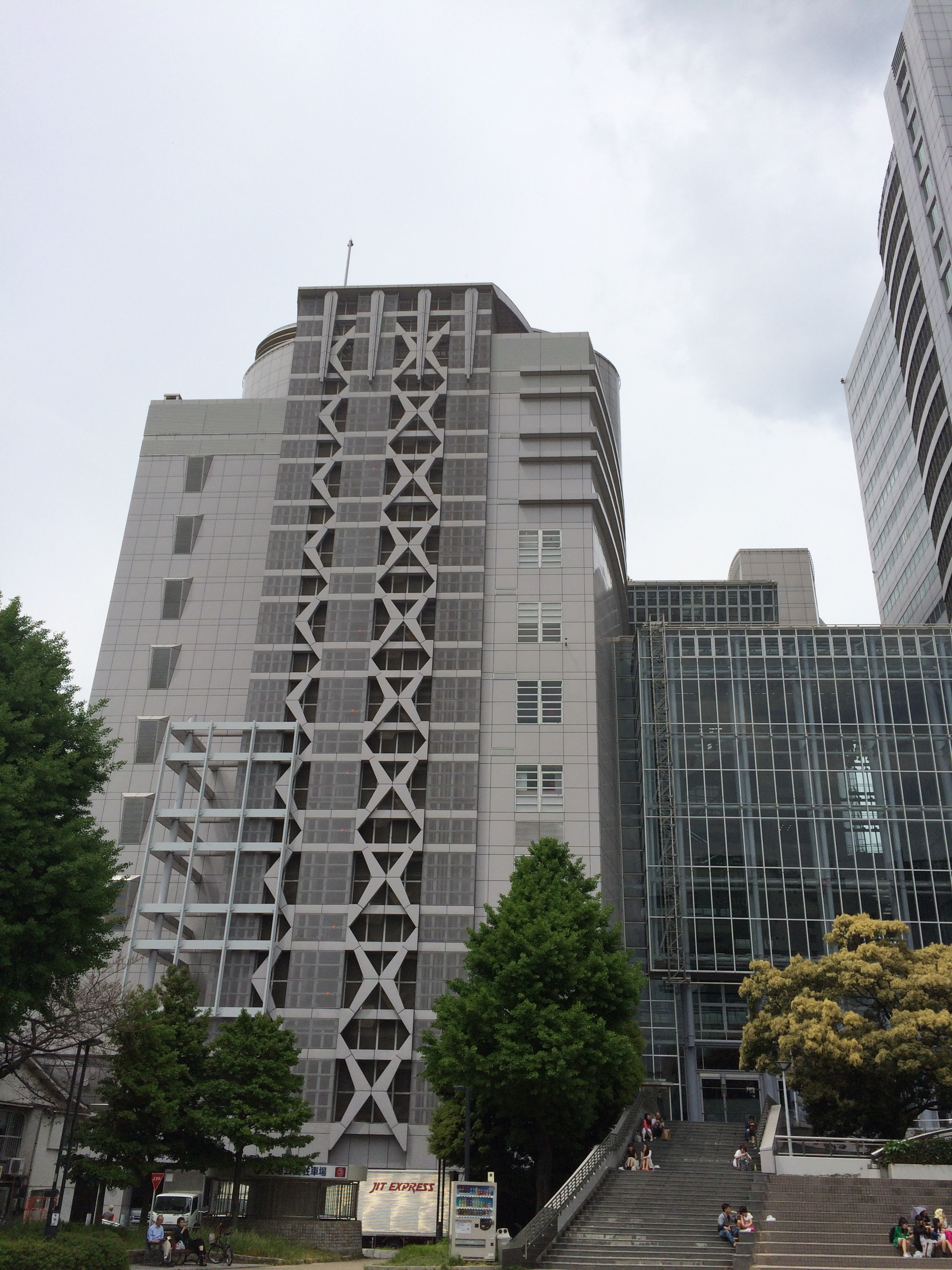 ナディアパーク デザインセンタービル